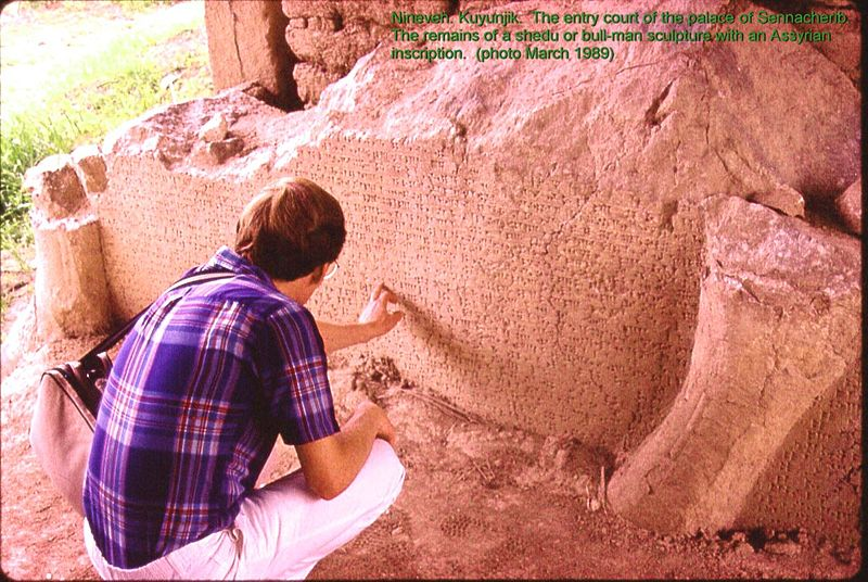 مدخل قصر سنحاريب على تل كويونجيك في نينوى الذي يحمل نقوشا آشورية. تم التقاط الصورة في مارس 1989 بواسطة فريدارك.